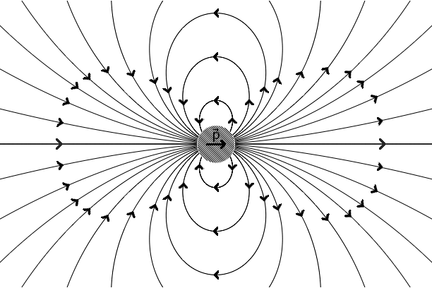 Lignes de champ pour un dipôle électrique Auteur: François Le Maître (Franckyboy) Catégorie:Schéma de physique